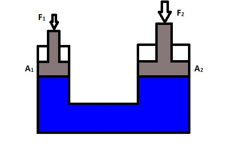 Macaco hidráulico